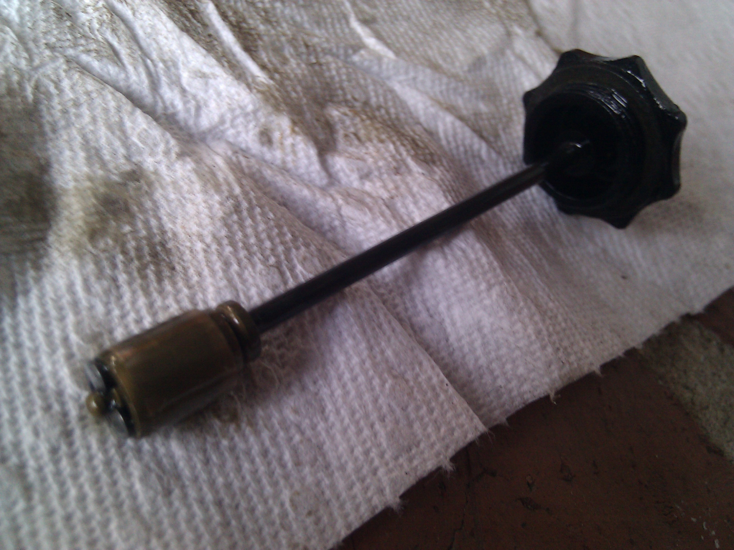 Disassembling front SU HS6 carburetor S. U. 122 carburettor HS6 Volvo Amazon 1966